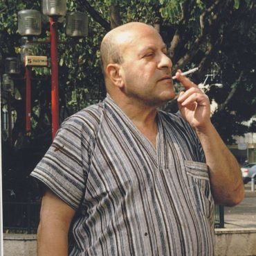 המתורגמן מיכה פרנקל